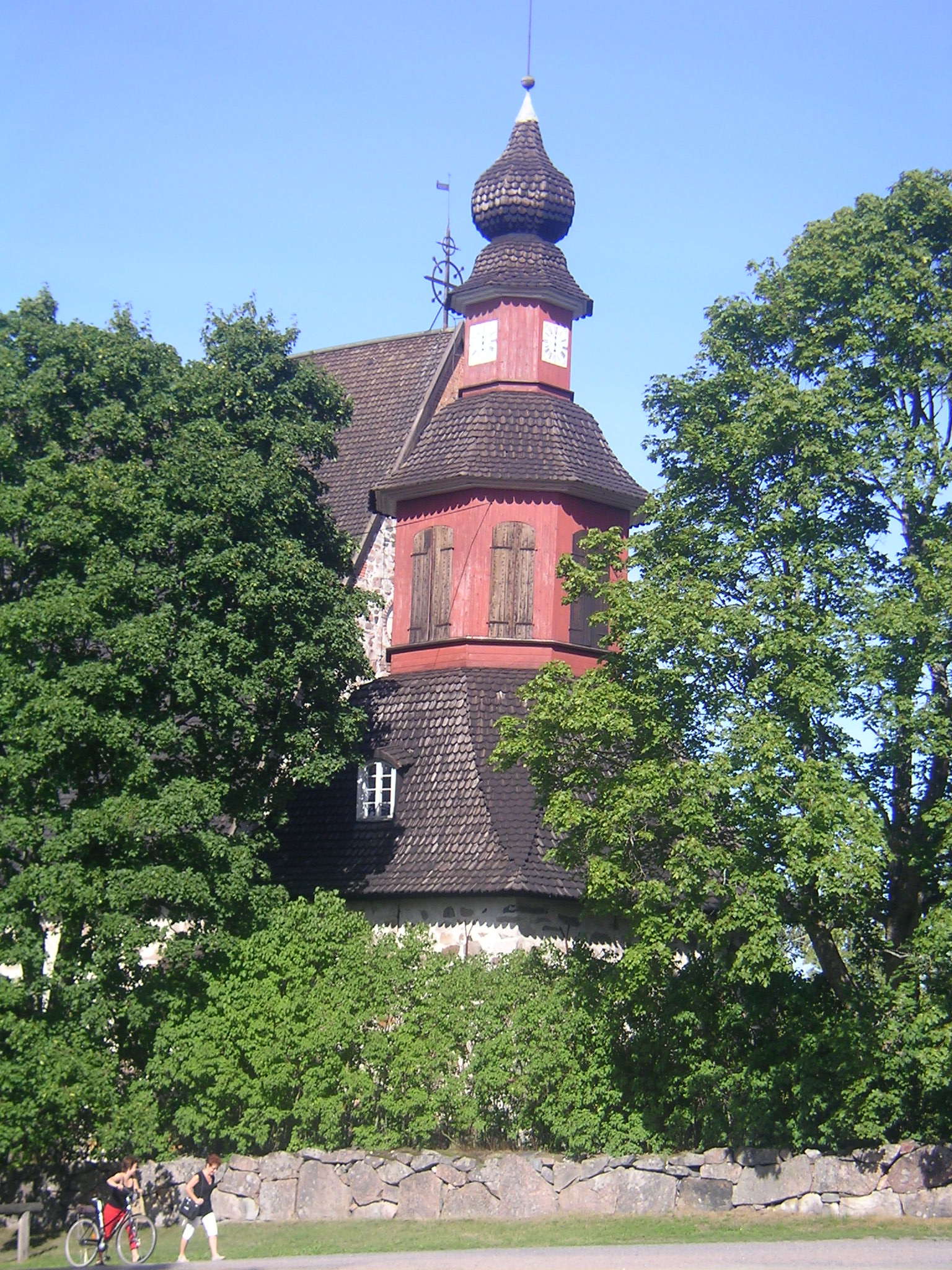 The belltover in Perniö, Finland.